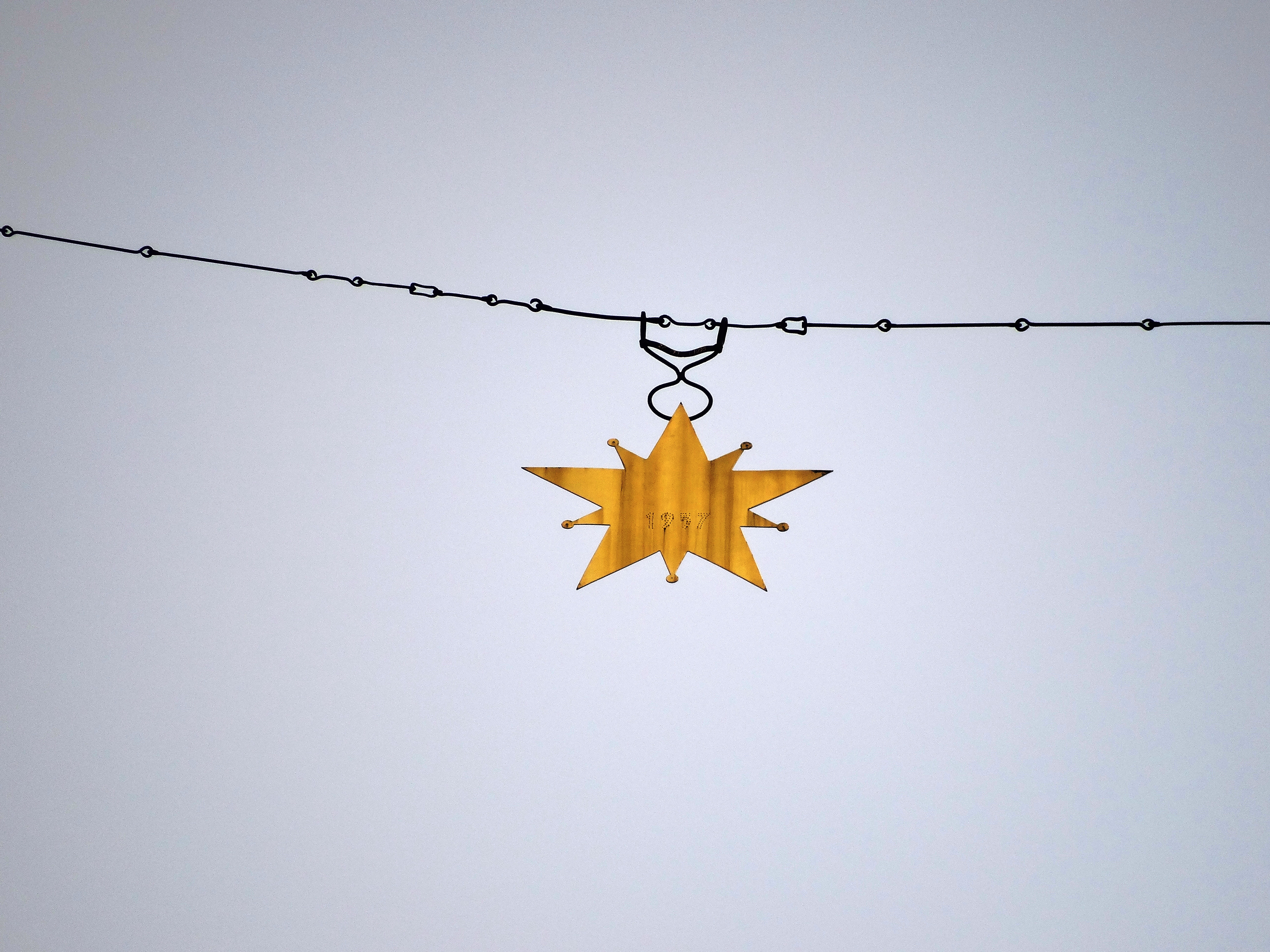 Etoile suspendue au dessus de Moustiers-Sainte-Marie